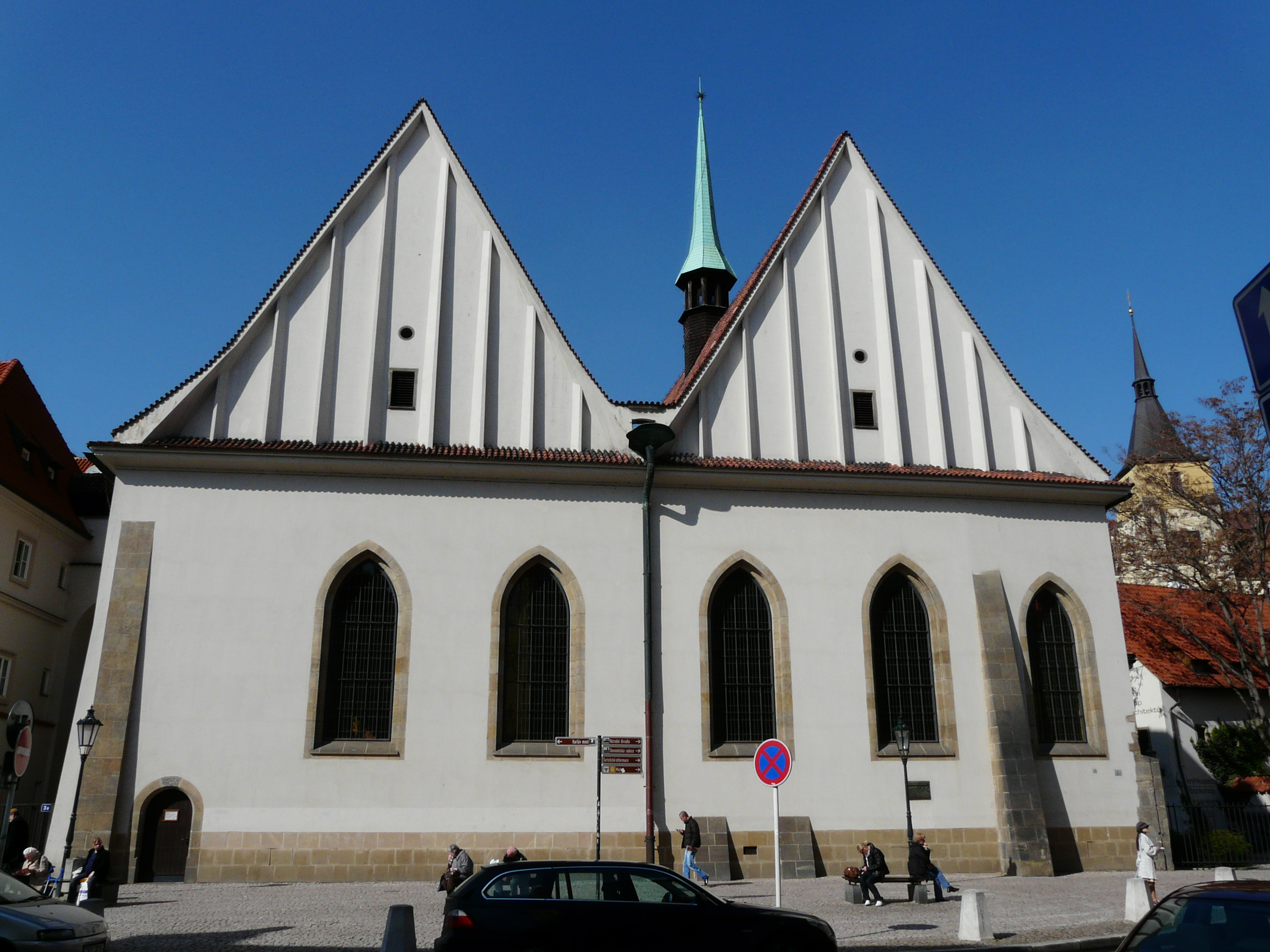 Bethlehem Chapel Prague